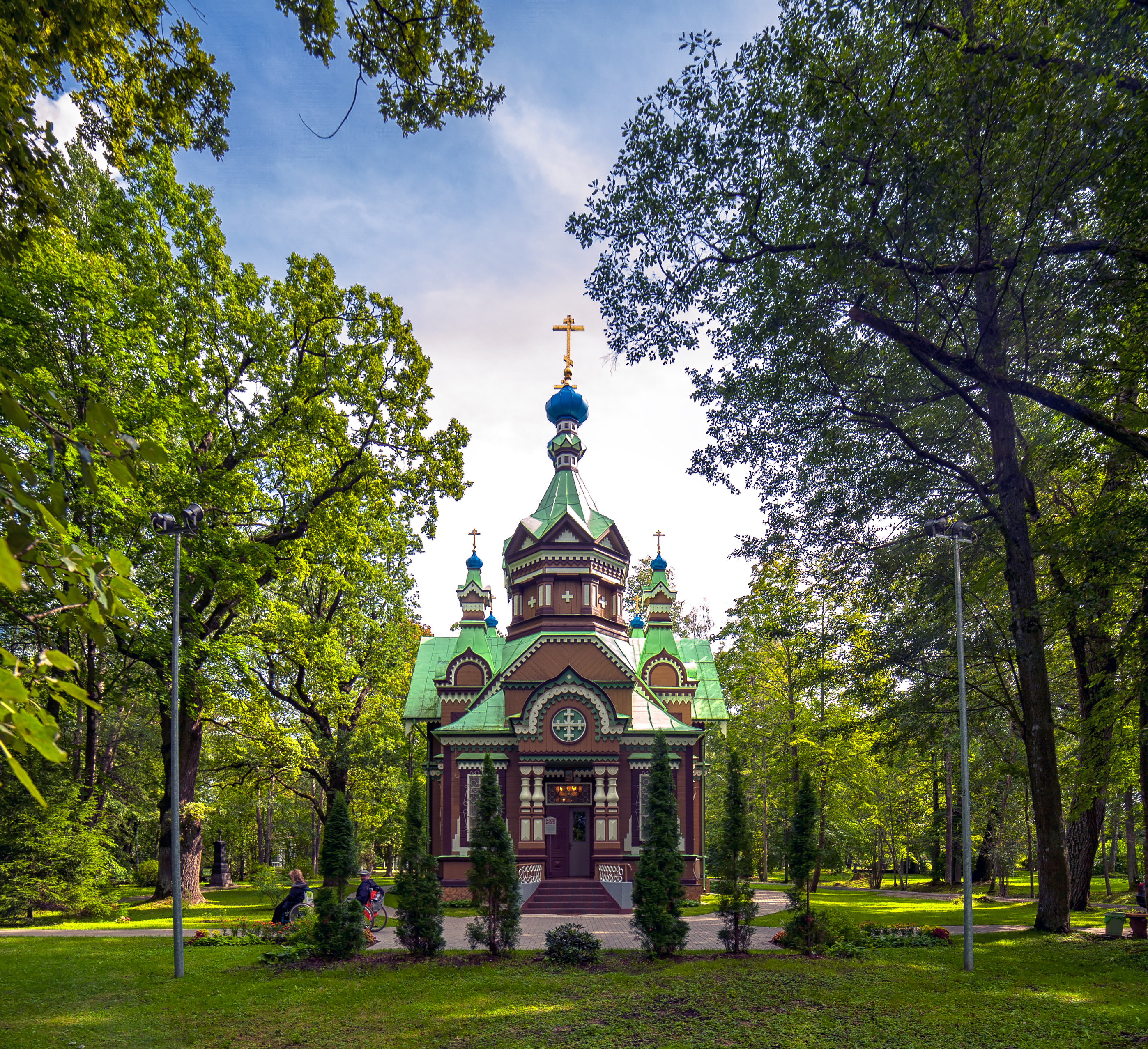 Sv.Pētera un Pāvila Ķemeru pareizticīgo baznīca, Jūrmala, Katedrāles iela 1